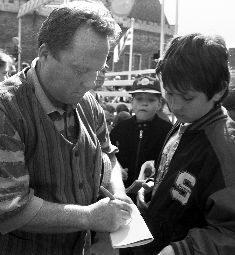 Mihkel Smeljanski, laulja ja näitleja 94